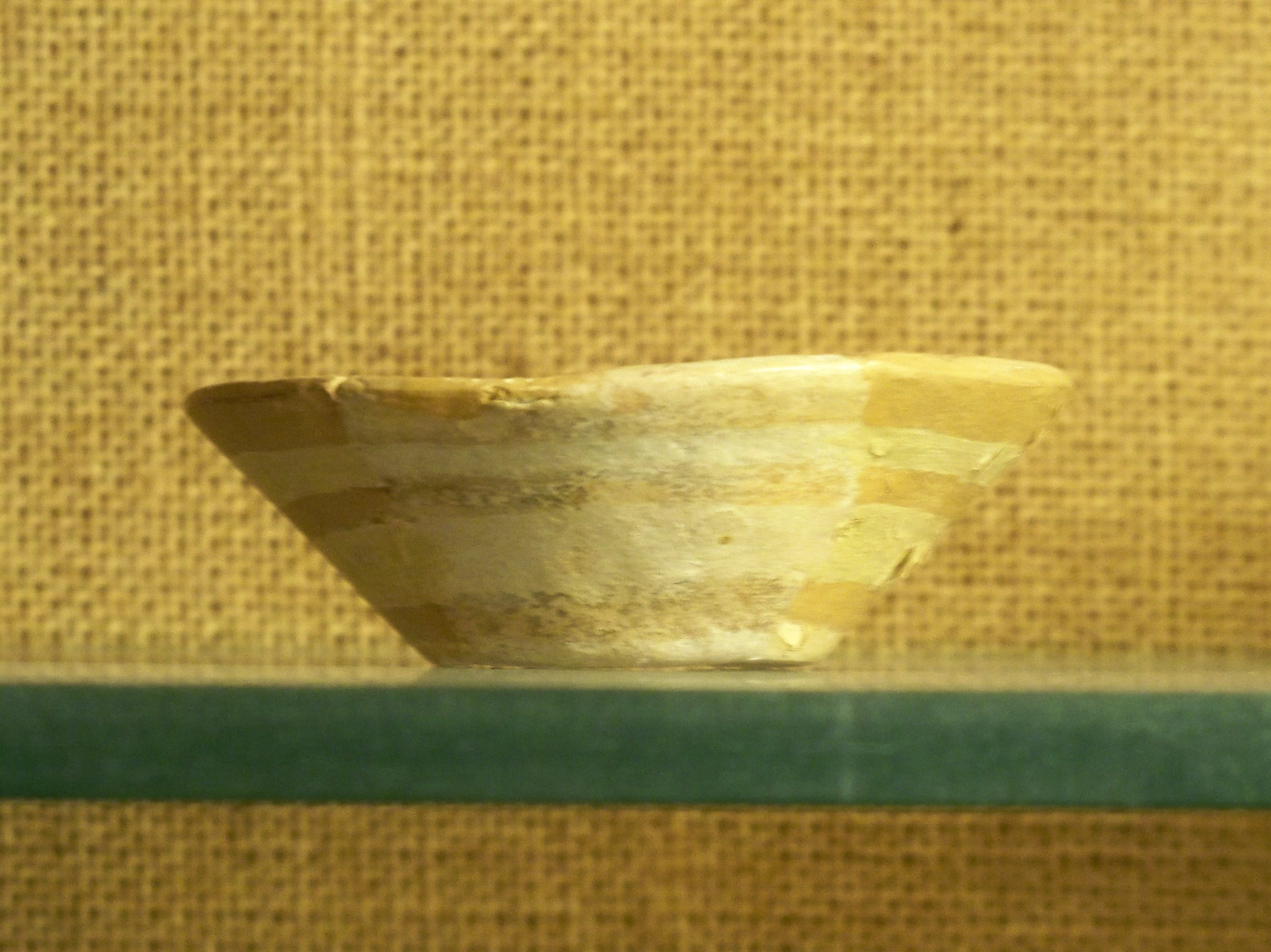 Vase à vin, au musée du Pègue, Drôme, France